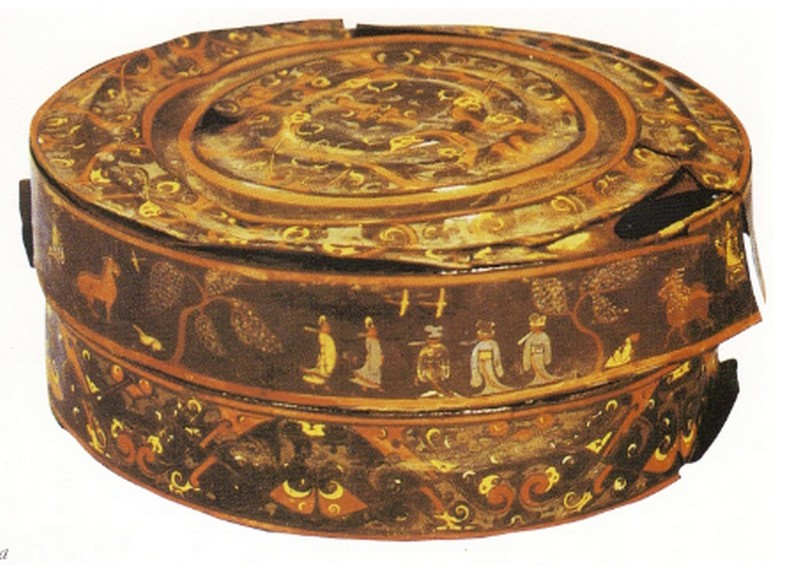 (cf. fig. 9) Détail de l'ensemble d'une Boite laquée, tombe 2 de Baoshan, Jingmen, province du Hubei, anonyme, Zhou orientaux, 316 av. J.C.-C ou ant. : Scène de procession et de congratulation, haut. 10,8 cm, diam. 27,9 cm. Au Musée provincial de Hubei.